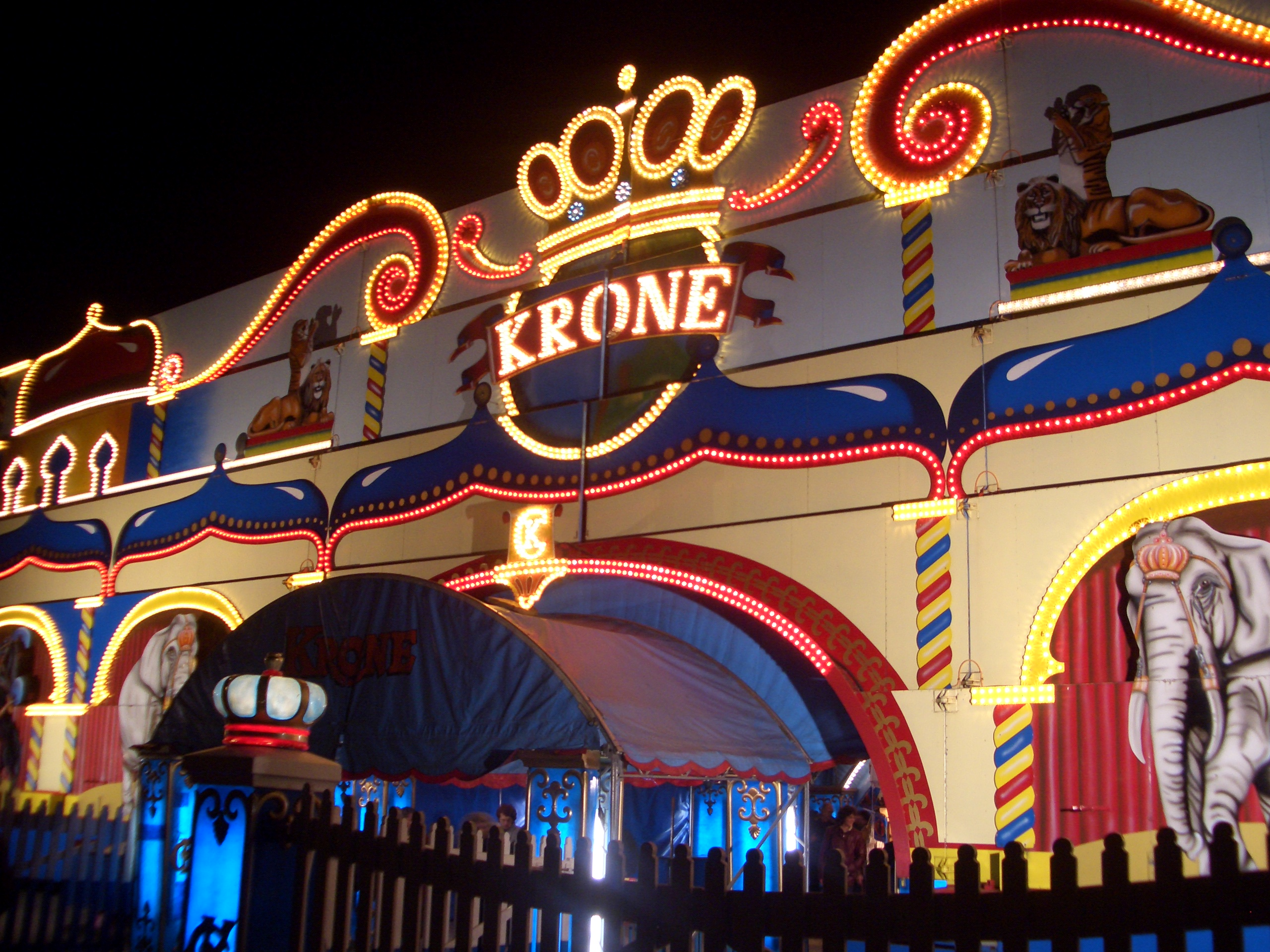 Eingangsportal des Circus Krone